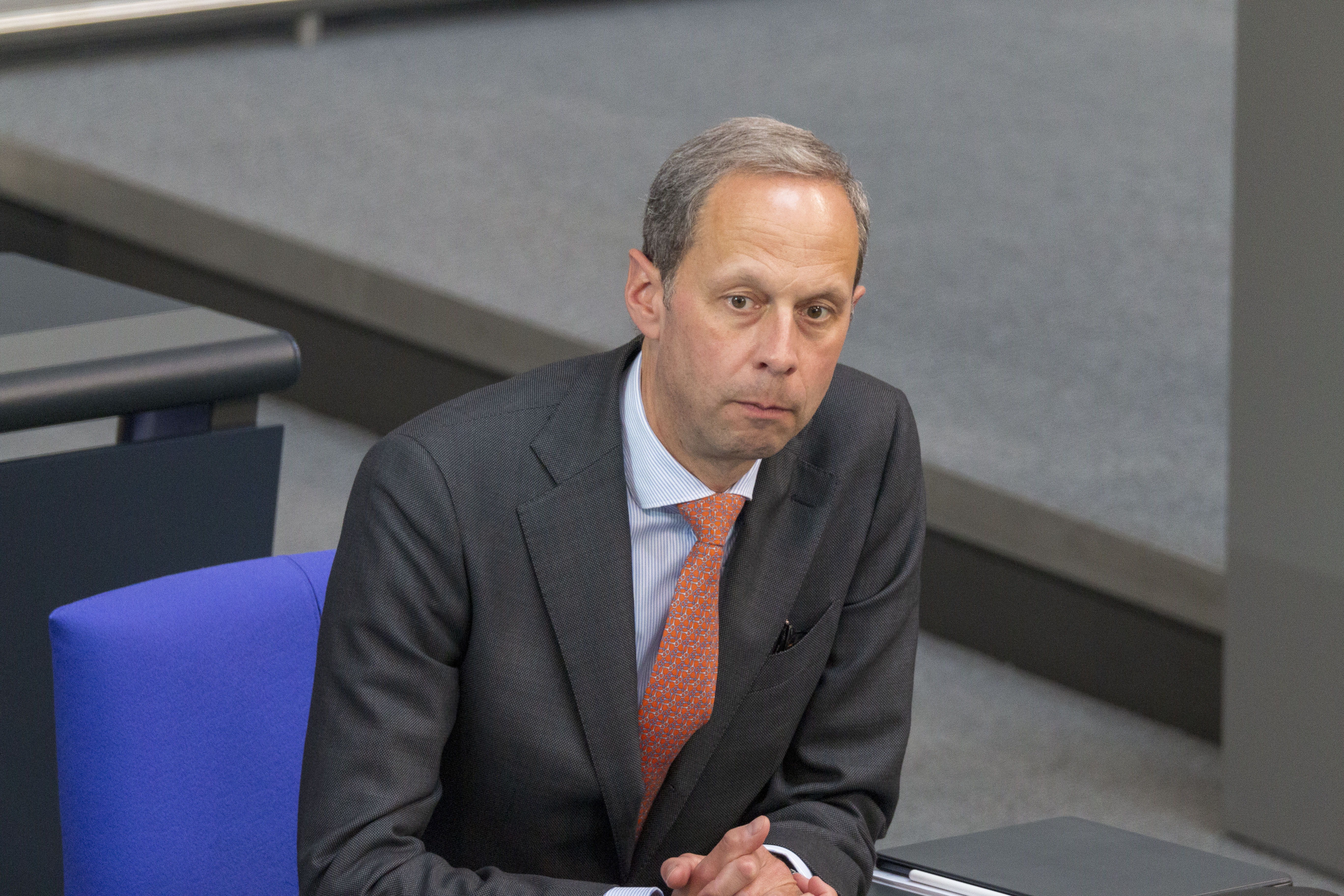 Hendrik Hoppenstedt, Bundestagsabgeordneter der ABC während der Plenarsitzung des Deutschen Bundestages am 2. Juli 2020 in Berlin.